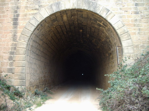 Der Tunnel von Valdealgorfa (2136 m), Tunnelende als Lichtpunkt sichtbar